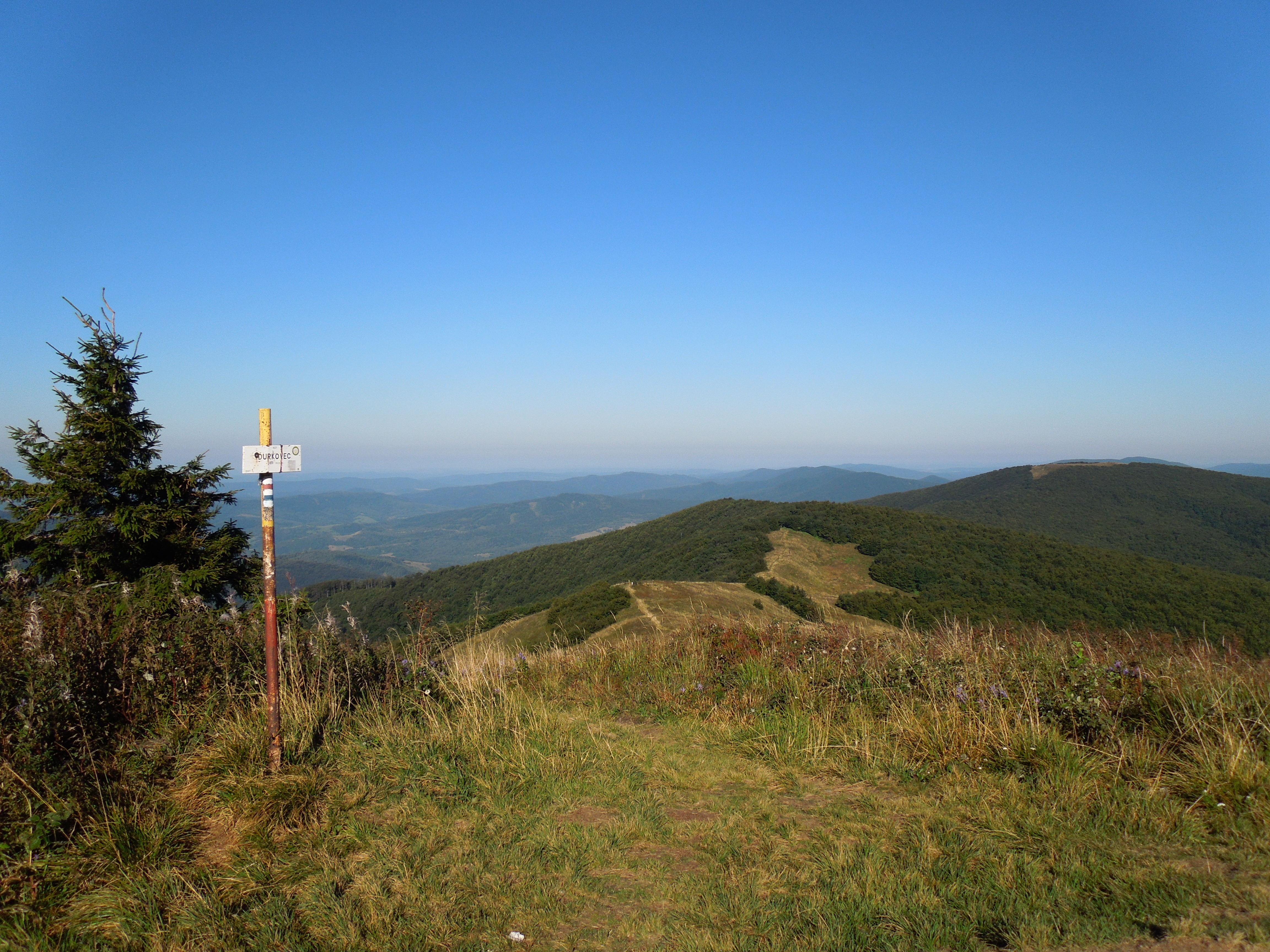 Vrchol Ďurkovca s výhľadom koncom augusta